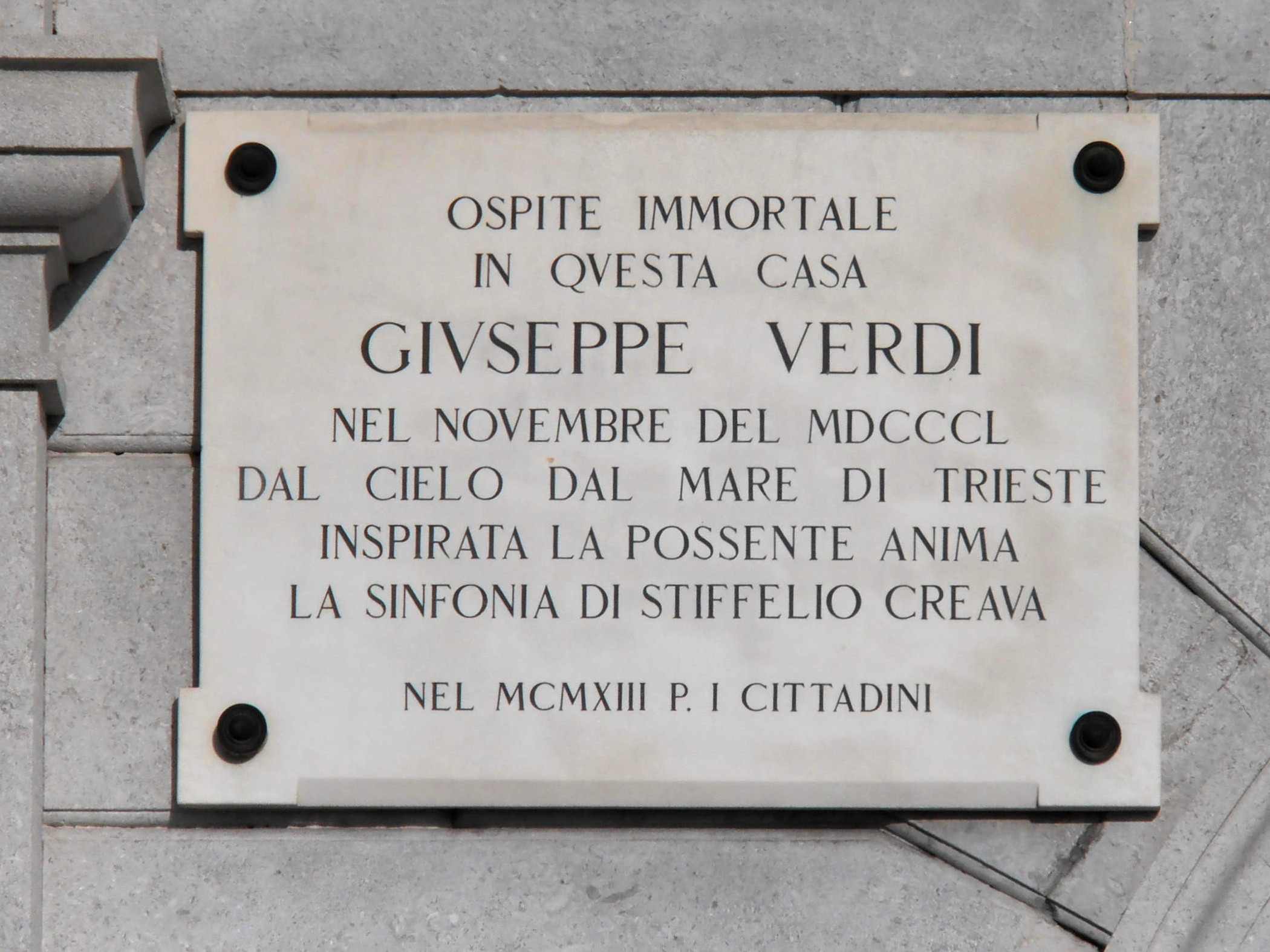 Italy - Trieste - Hotel de la Ville - Targa a Giuseppe Verdi